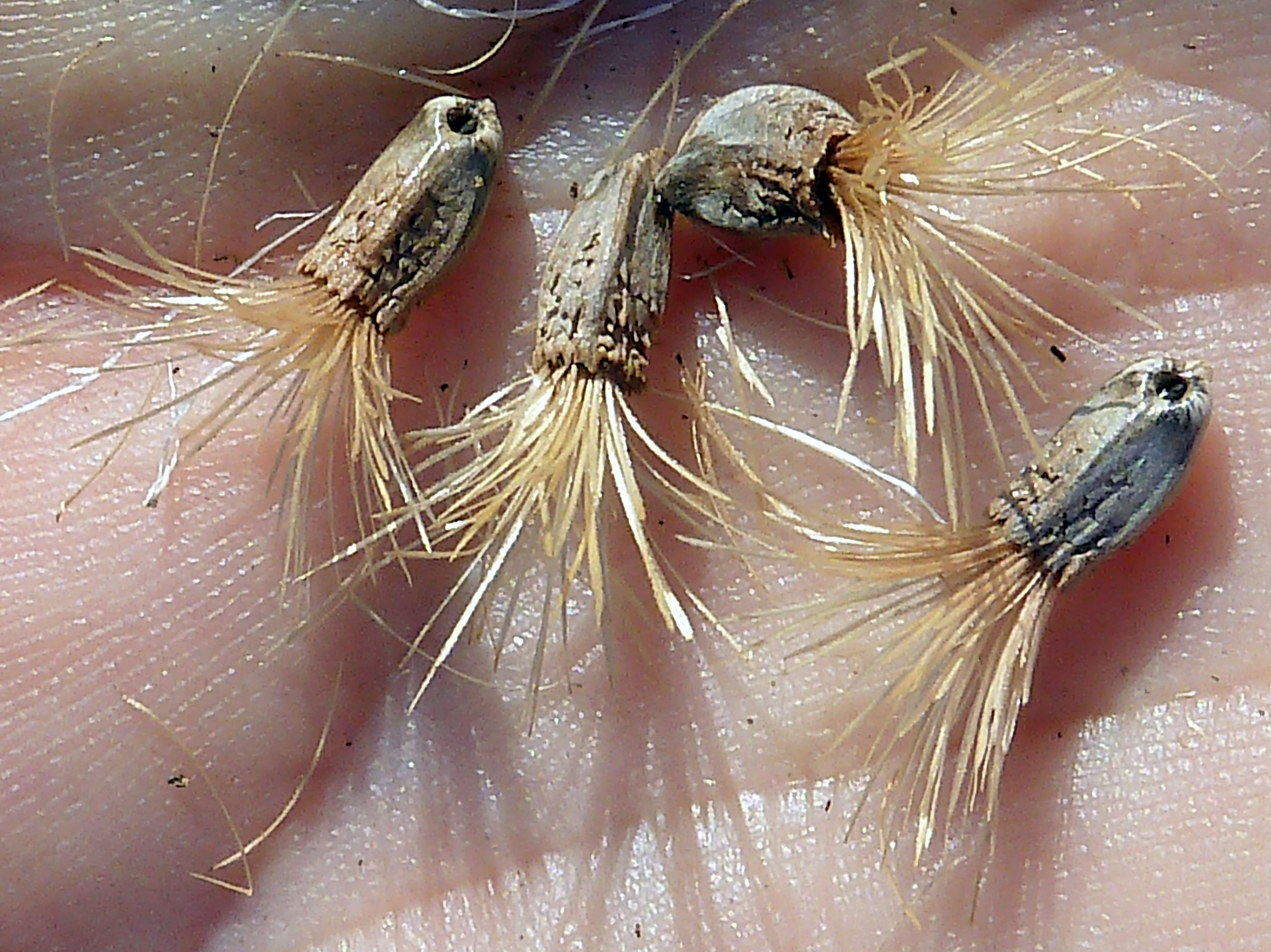 Carthamus arborescens : Cipselas - Camino de la Azarbe de Patricio, Albatera (Alicante, España).